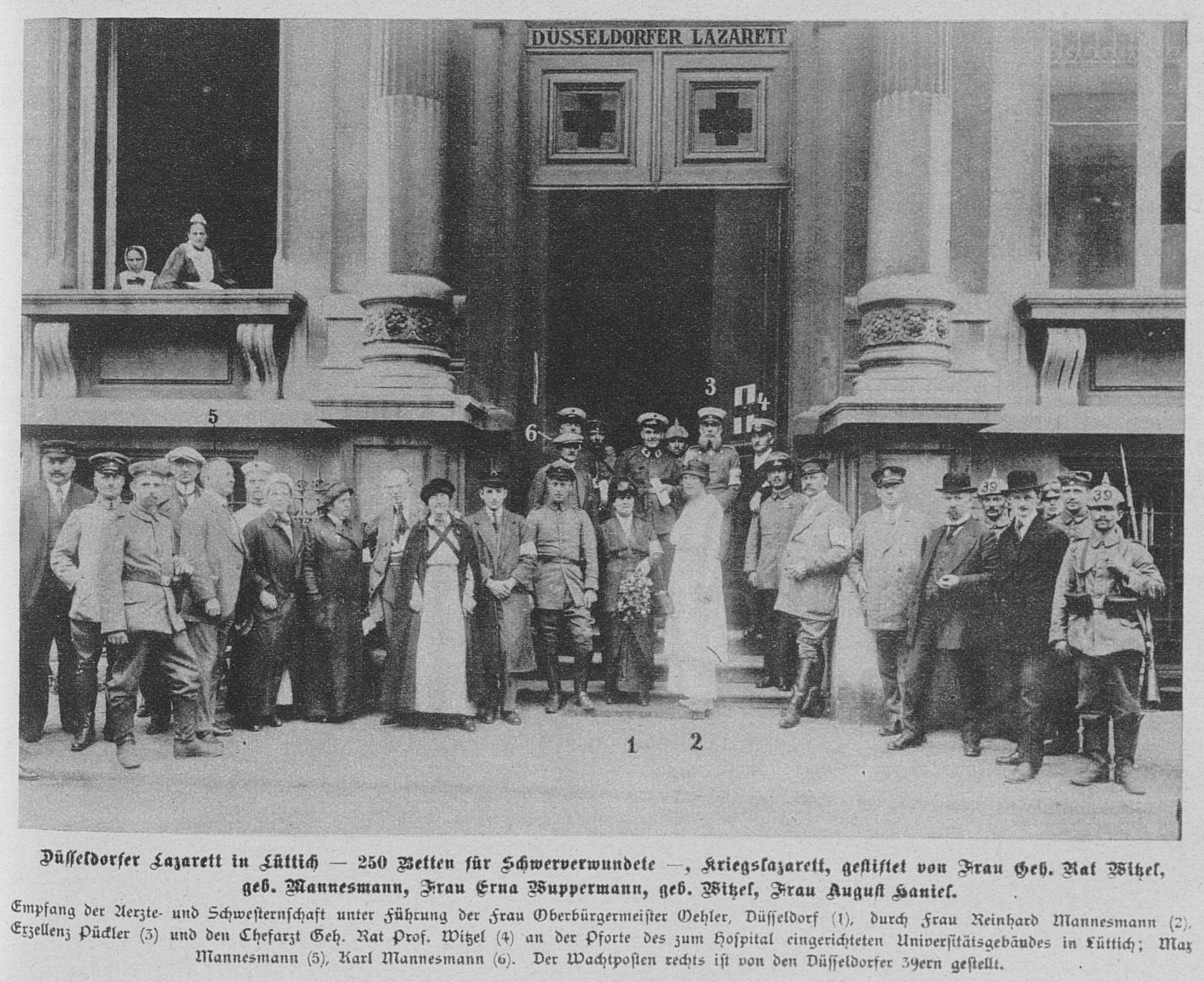 Düsseldorfer Lazarett in Lüttich – 250 Betten für Schwerverwundete –, Kriegslazarett, gestiftet von Frau Geh. Rat Witzel, geb. Mannesmann, Frau Erna Wuppermann, geb. Witzel, Frau August Haniel. Empfang der Ärzte- und Schwesternschaft unter Führung der Frau Oberbürgermeister Adalbert Oehler (1), Düsseldorf, durch Frau Reinhard Mannesmann (2), Exzellenz Pückler (3) und den Chefarzt Geh. Rat Prof. Oskar Witzel (4) an der Pforte zum Hospital eingerichteten Universitätsgebäudes in Lüttich (Place du Vingt Août No. 9); Max Mannesmann (5), Karl Mannesmann (6). Der Wachposten rechts ist von den Düsseldorfer 39ern gestellt. Abbildung in Rhein und Düssel, vom 12. September 1914